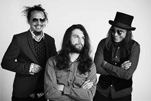 foto de estudio de Luz Verde